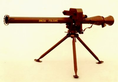 Lanciarazzi c/c Breda "Folgore", Esercito Italiano